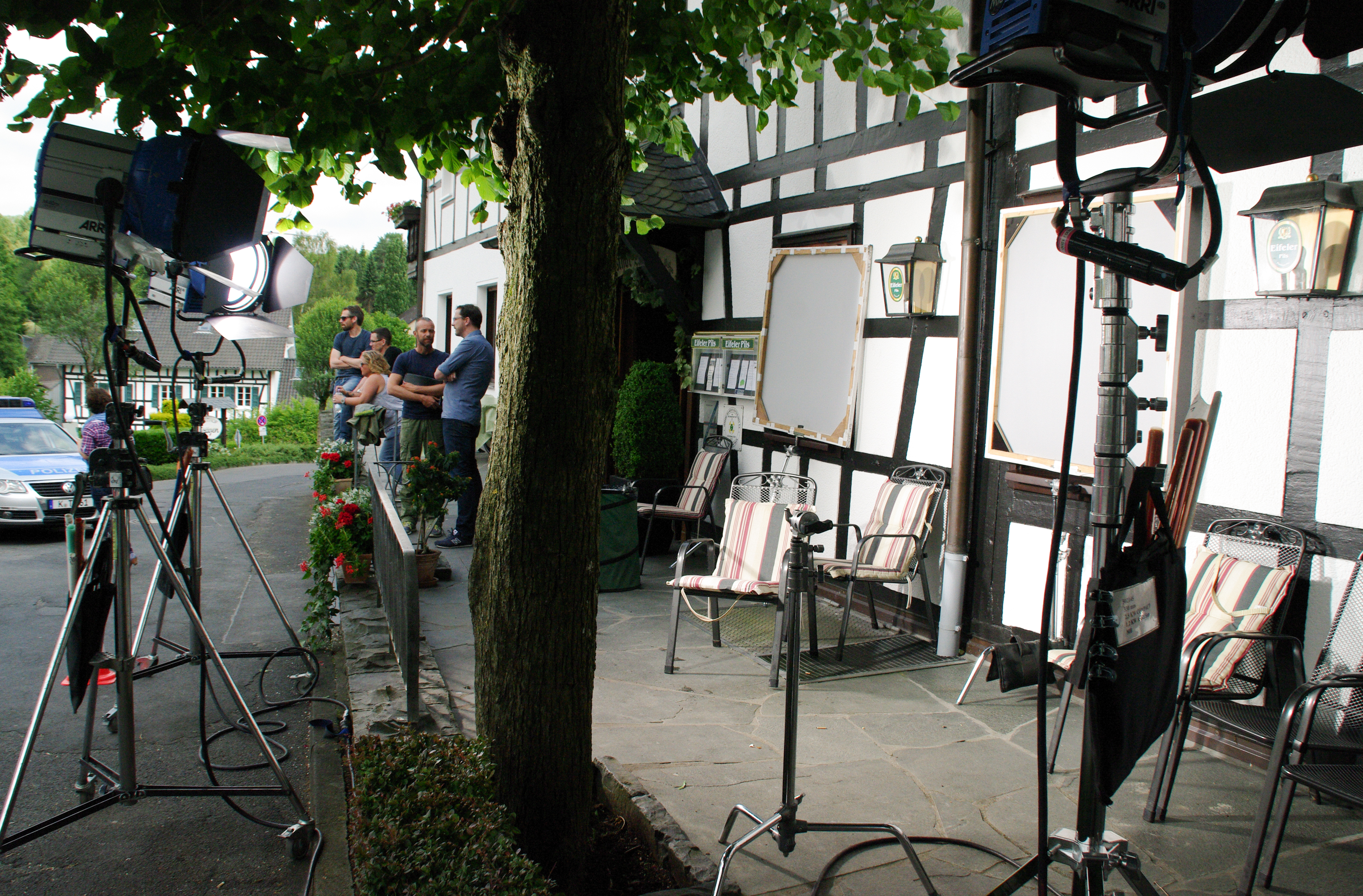 Settermin ARD Serie "Mord mit Aussicht" am 13-Juni 2014 in Neunkirchen-Seelscheid